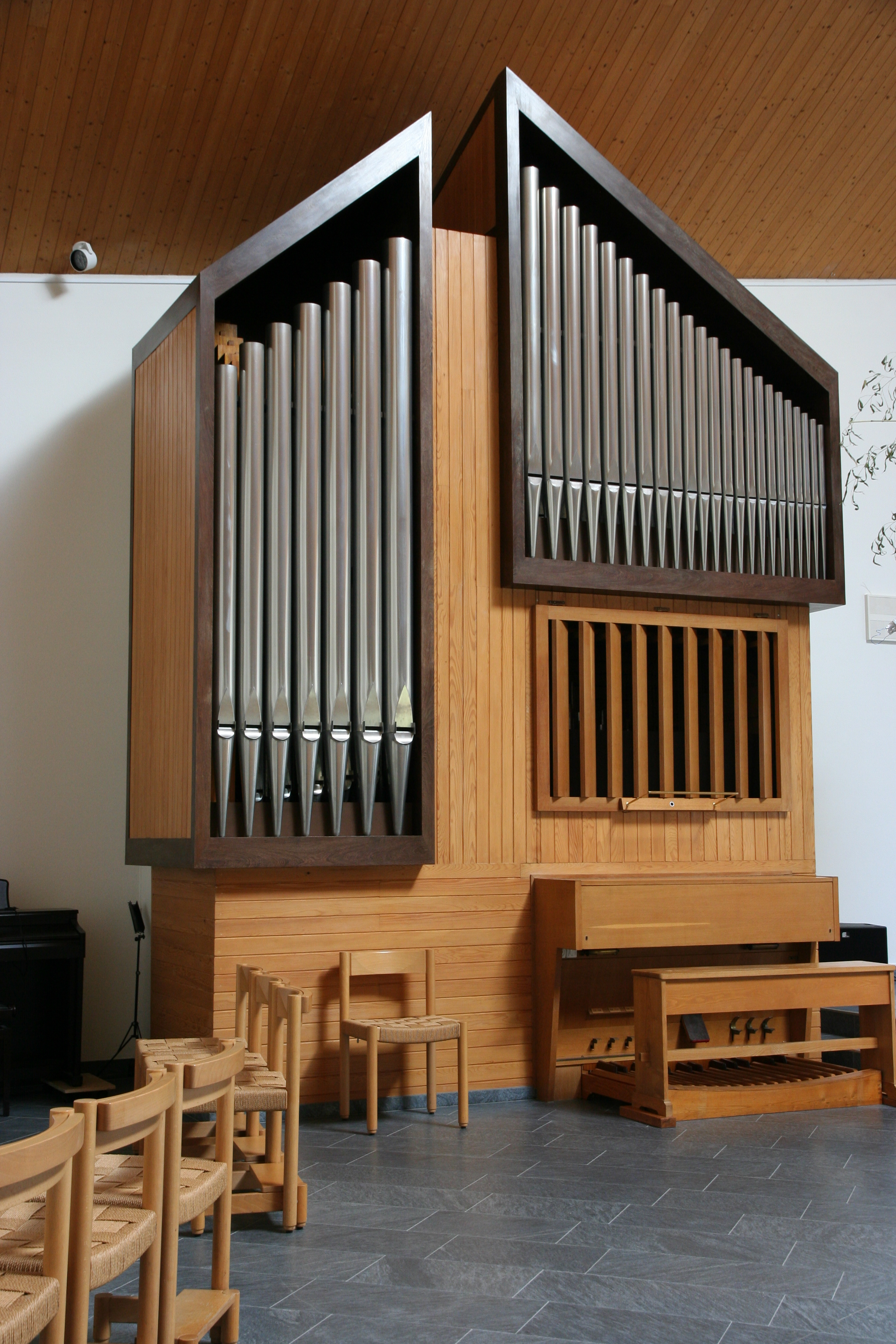 Römisch-katholische Kirche St. Michael Uitikon